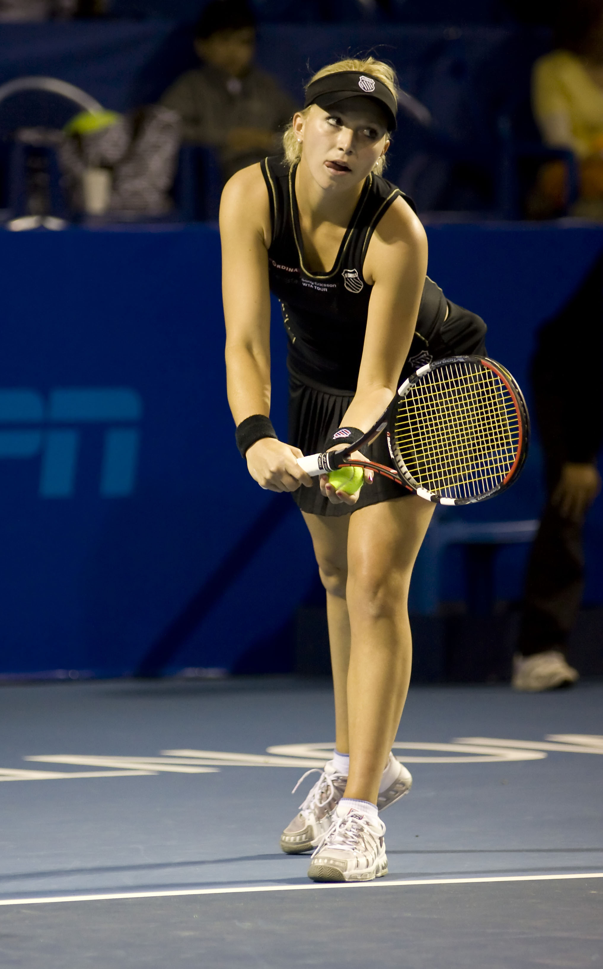 Michaëlla Krajicek